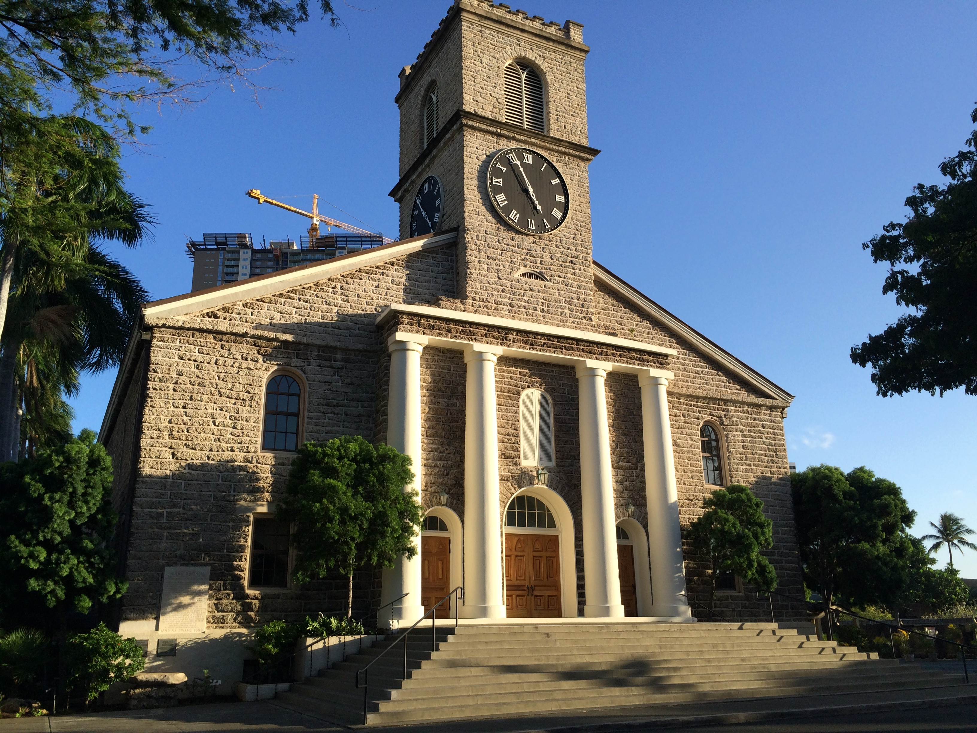 Kawaiahao Church